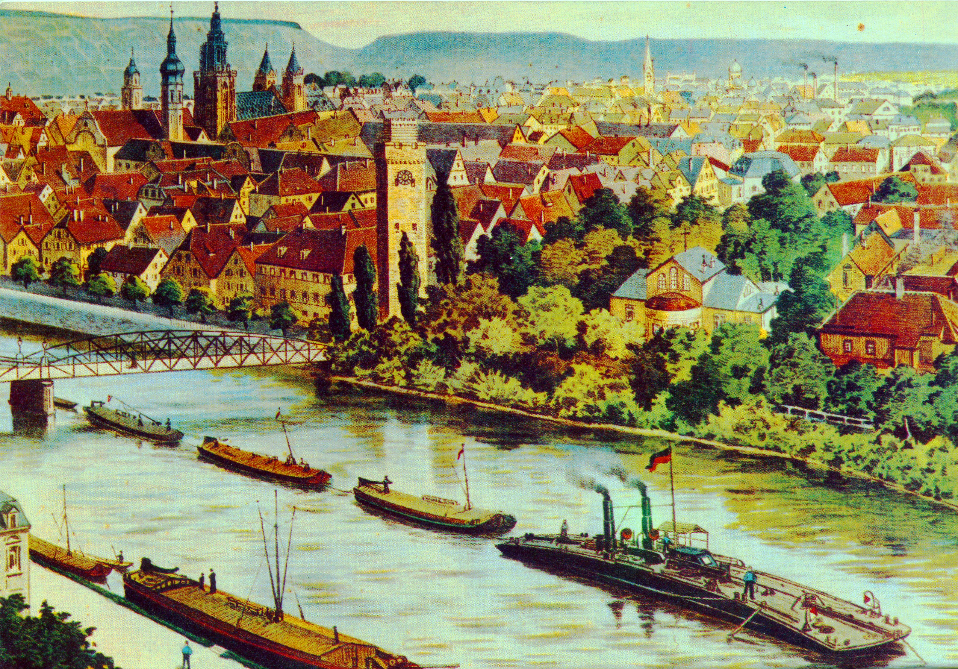 Kettenschifffahrt in Heilbronn 1902. Lithographie